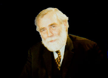 Portrait de Pierre Carron.